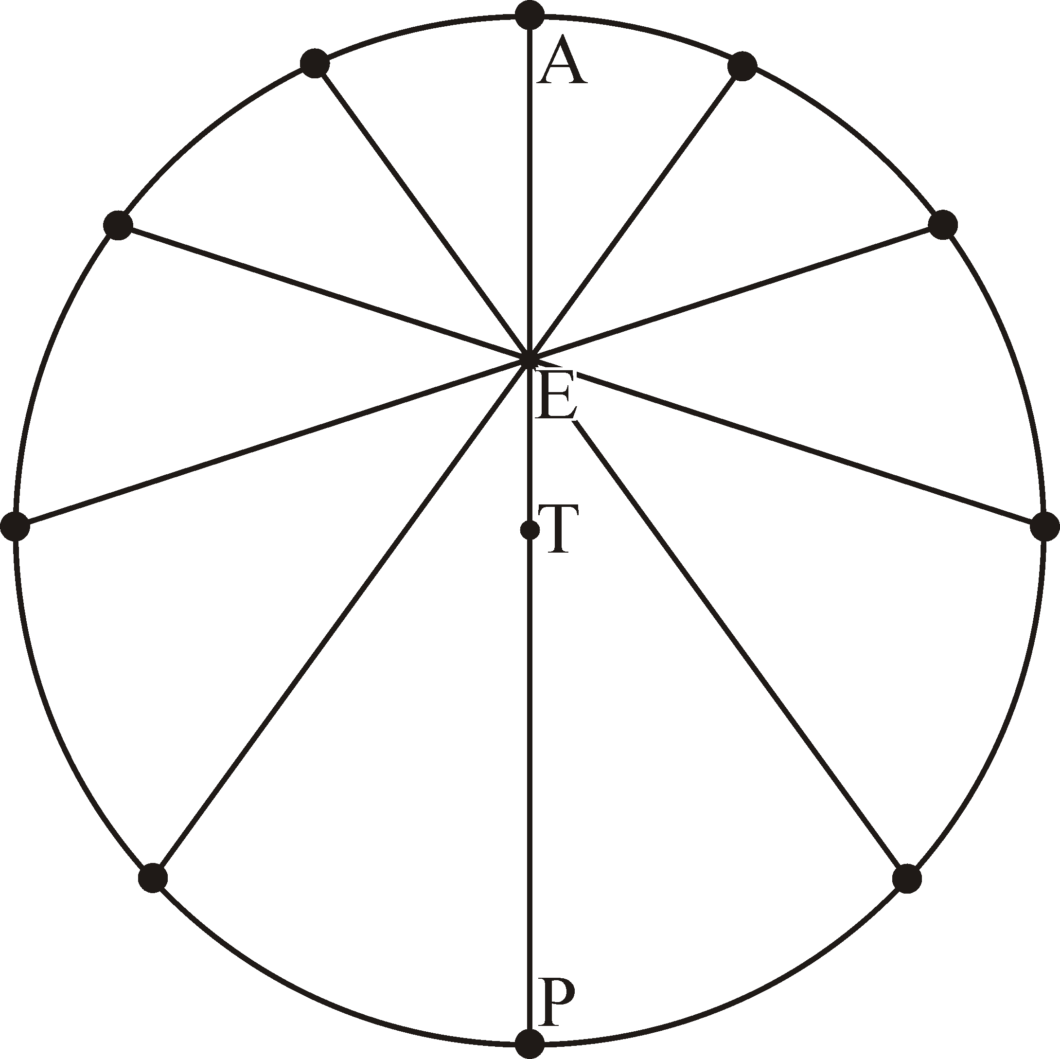 Эквант у индусов